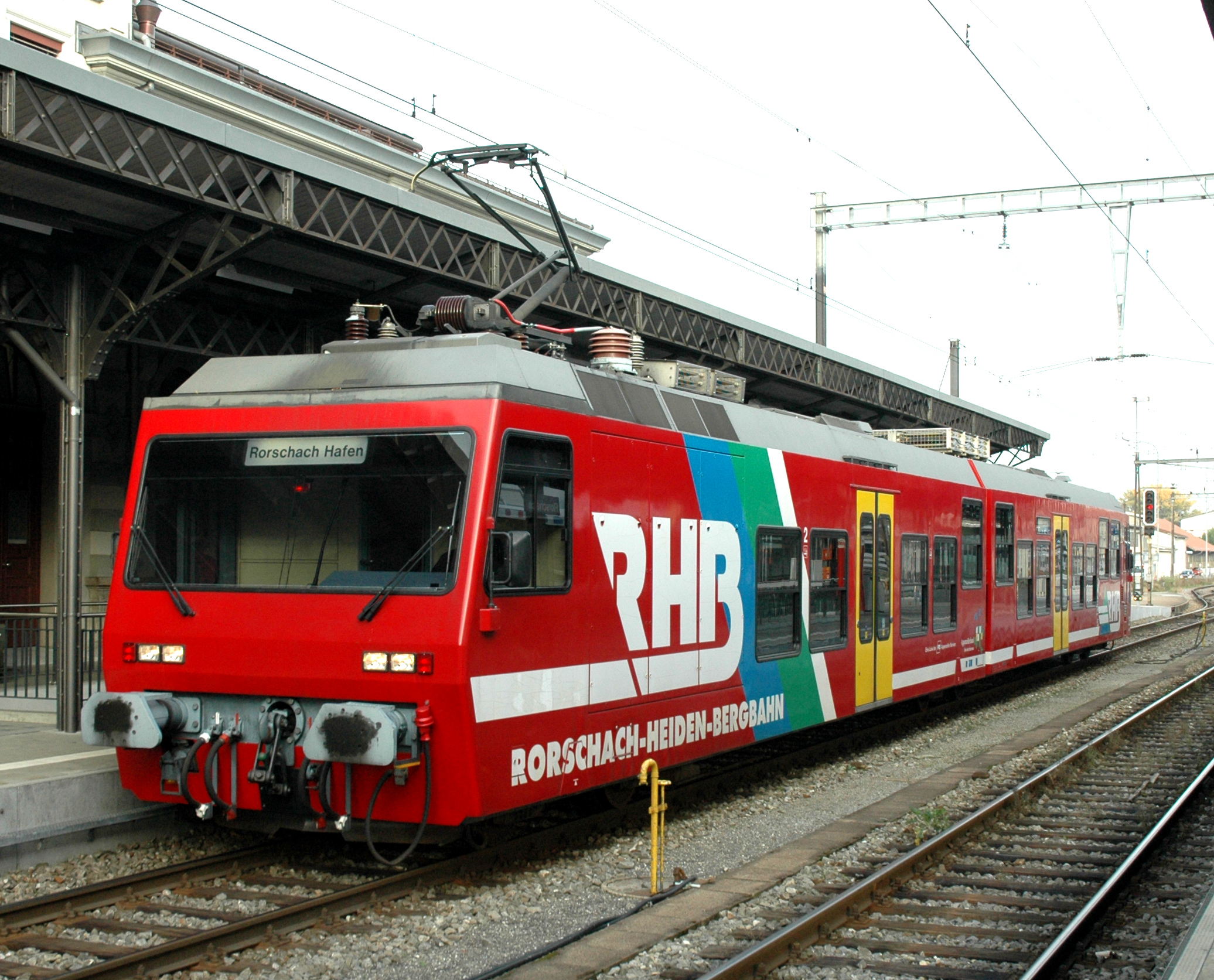 Rorschach-Heiden-Bergbahn (RHB) treinstel BDeh 25 op 27 oktober 2006 te Rorschach.